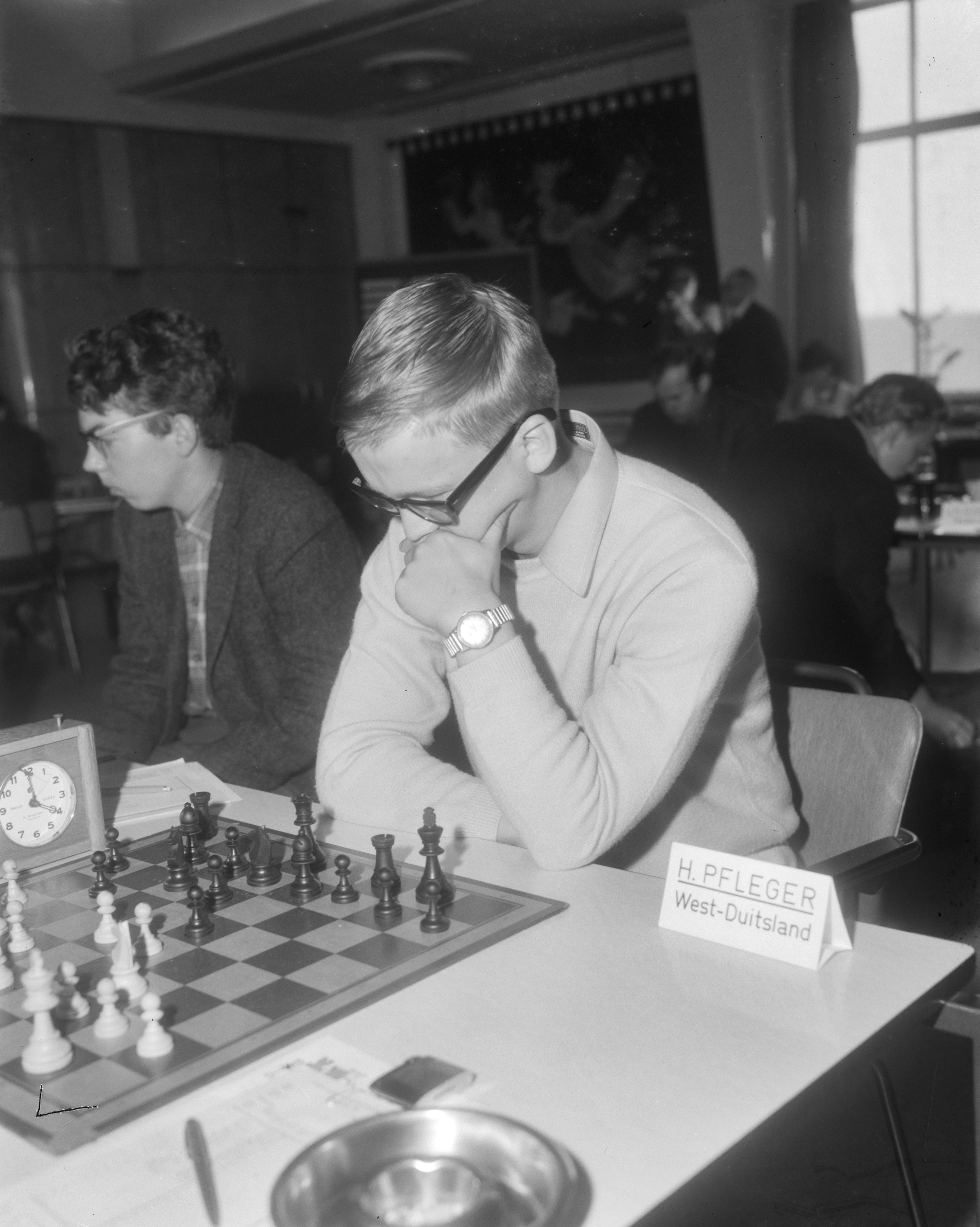 Collectie / Archief : Fotocollectie Anefo Reportage / Serie : Fédération Internationale des Échecs (FIDE) -Zone schaaktoernooi 1966 in de kantine van 'De Nederlanden van 1845' te Den Haag Beschrijving : De West-Duitse Grootmeester Helmut Pleger aan het schaakbord Datum : 7 oktober 1966 Locatie : Den Haag, Zuid-Holland Trefwoorden : schaken, sport, toernooien Persoonsnaam : Pfleger, H. Fotograaf : Bilsen, Joop van / Anefo Auteursrechthebbende : Nationaal Archief Materiaalsoort : Negatief (zwart/wit) Nummer archiefinventaris : bekijk toegang 2.24.01.04 Bestanddeelnummer : 919-6521